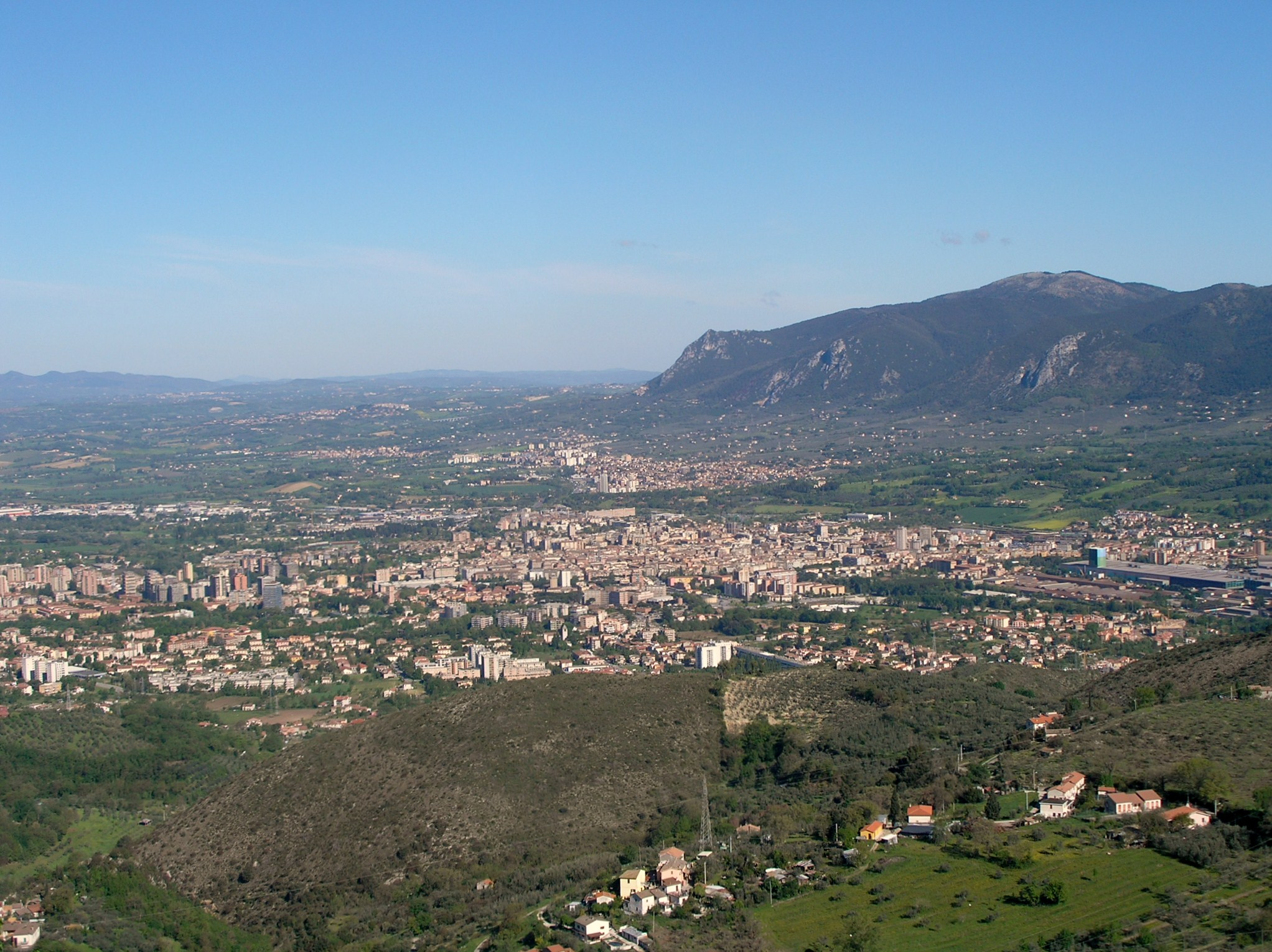 Descrizione = Immagine per Terni